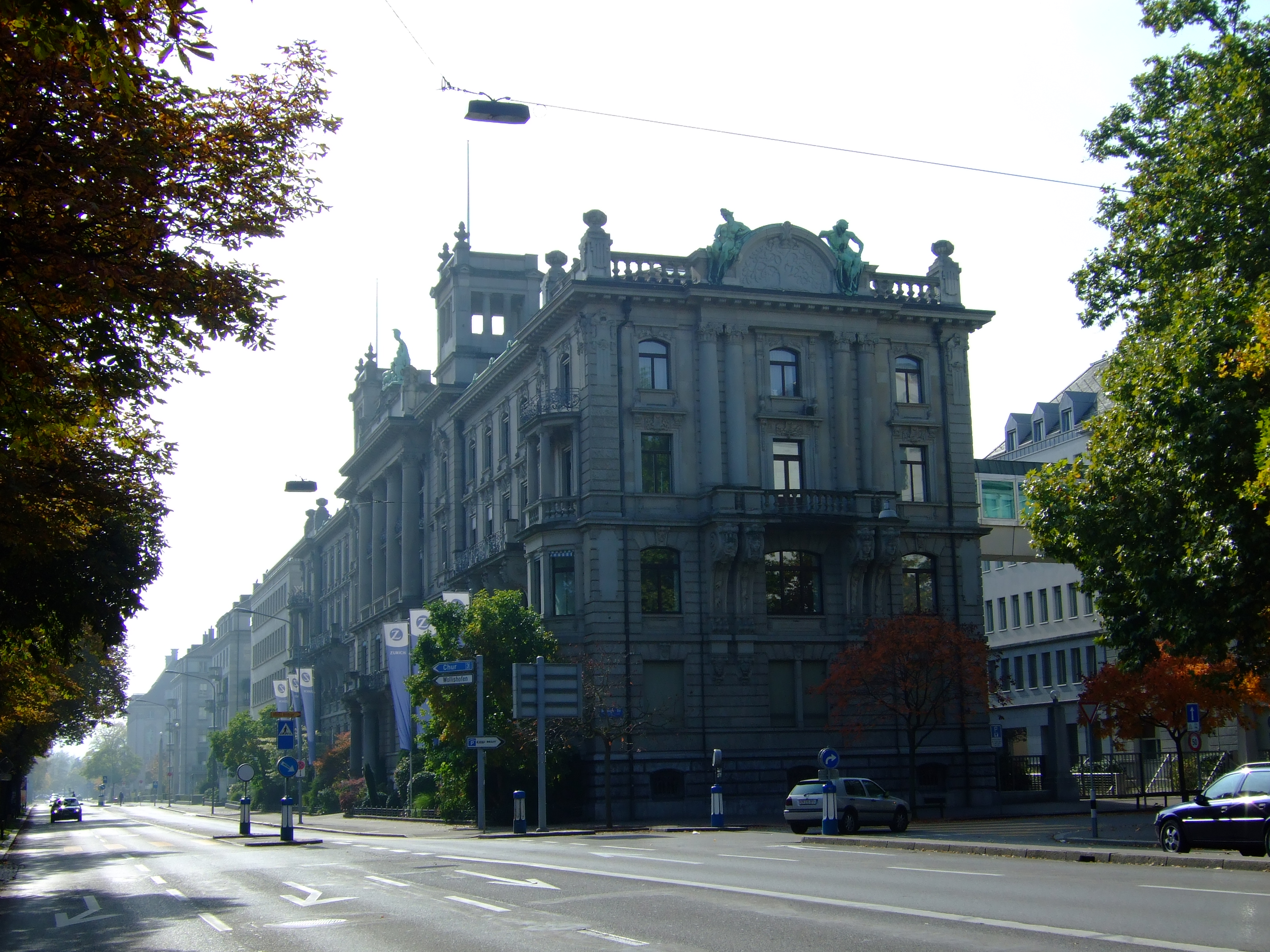 Hauptsitz der "Zurich Financial Services" («Zürich» Versicherungs-Gesellschaft) in Zürich am Mythen-Quai